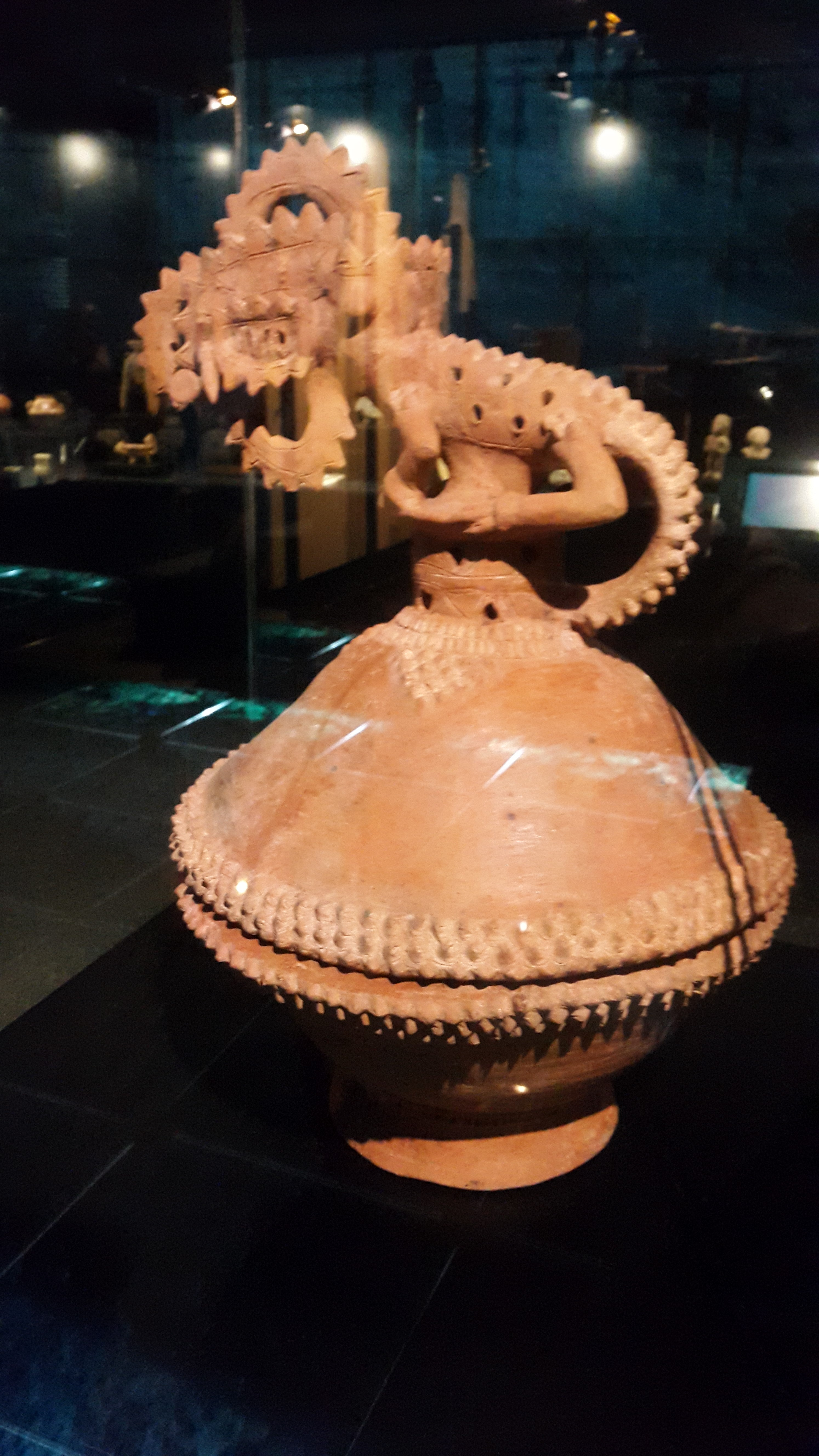 Incensario ceremonial de cerámica, que representa un volcán coronado por un lagarto. Museo del Jade de San José, Costa Rica.